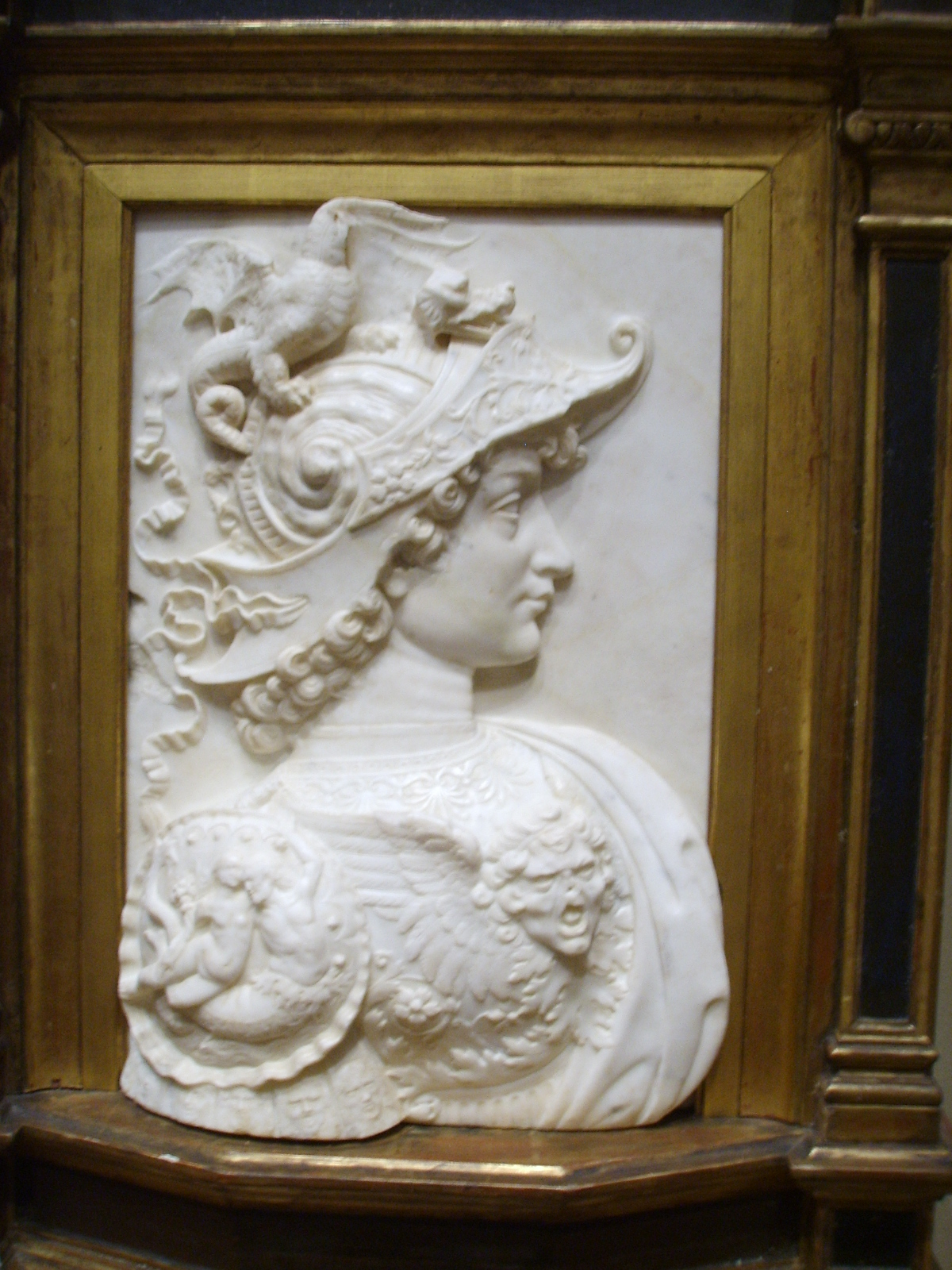 National gallery in washington d.c., bottega del verrocchio, alessandro il grande